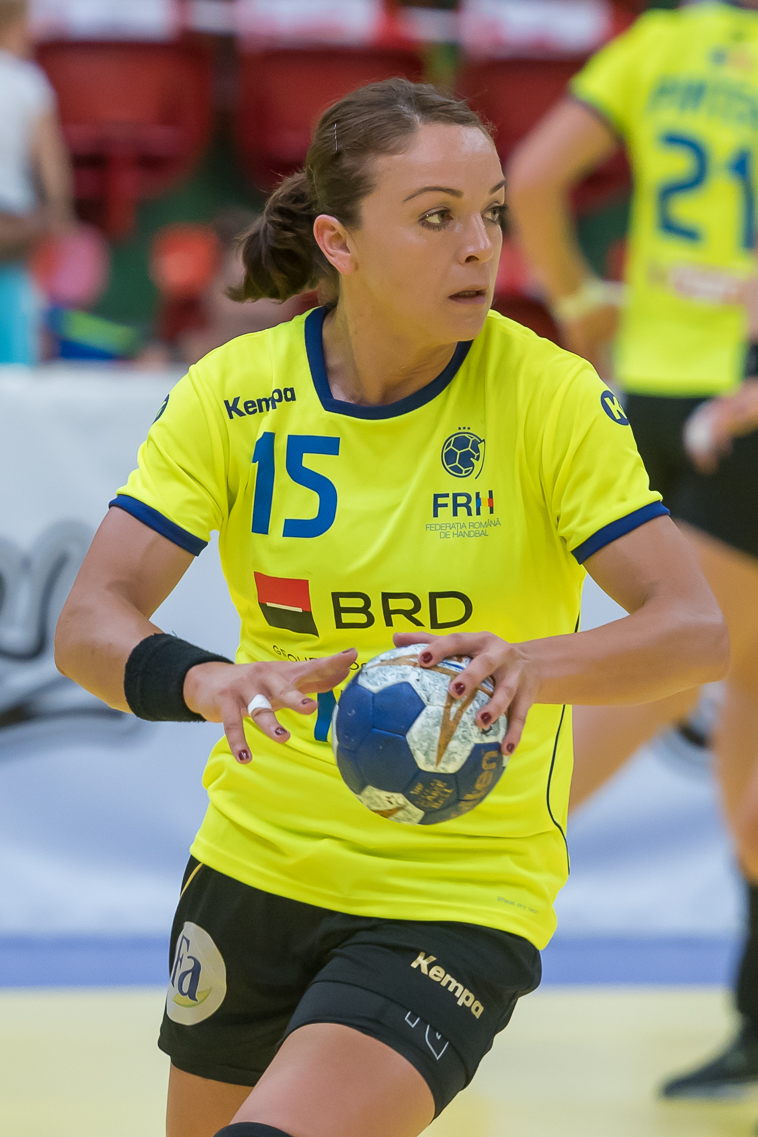 Damenhandball WM-Qualifikation Playoff Österreich vs Rumänien am 13. Juni 2017 in Stockerau. Bild zeigt Valentina Neli Ardean Elisei (ROU).